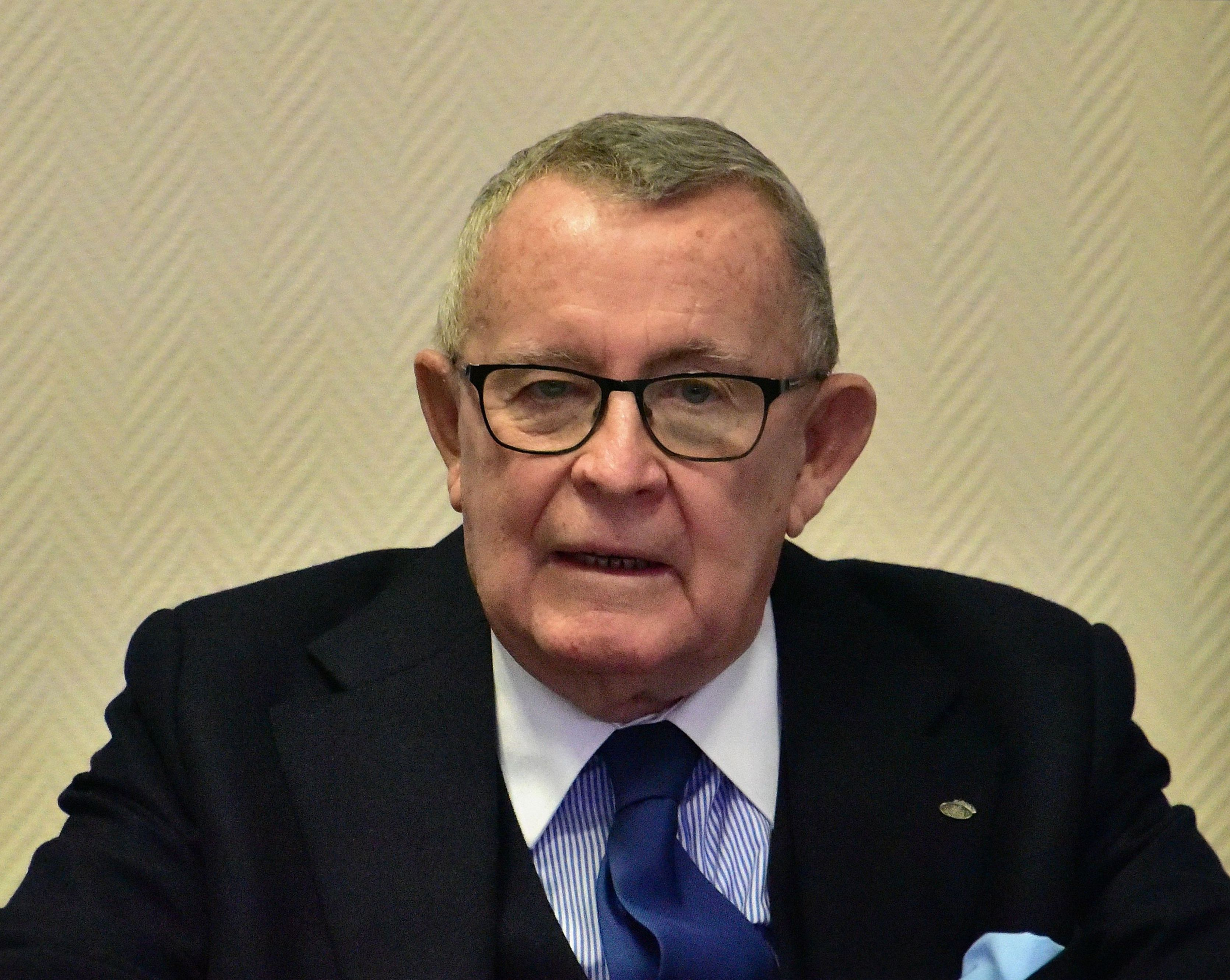 Prof. Andrzej K. Koźmińskiego z Akademii Leona Koźmińskiego podczas konferencji "W poszukiwaniu lepszego świata . Ekonomia i polityka" na ALK w Warszawie